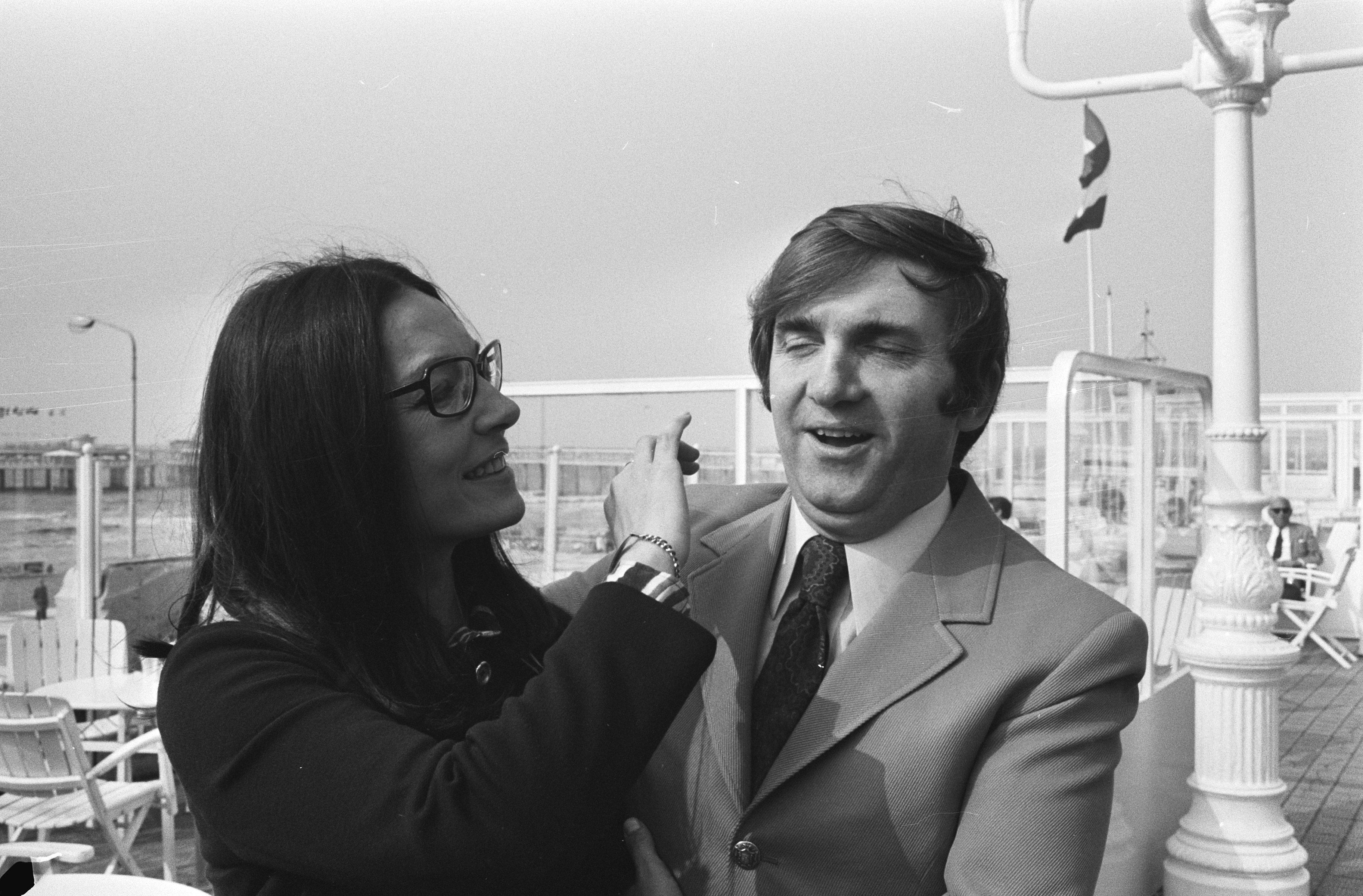 Collectie / Archief : Fotocollectie Anefo Reportage / Serie : Nana Mouskouri krijgt een gouden en een platina plaat in het Kurhaus te Beschrijving : Nana Mouskouri en haar echtgenoot George Petsilas Datum : 13 mei 1971 Locatie : Scheveningen, Zuid-Holland Trefwoorden : portretten, zangers Persoonsnaam : Mouskouri, Nana, Petsilas, George Fotograaf : Fotograaf Onbekend / Anefo Auteursrechthebbende : Nationaal Archief Materiaalsoort : Negatief (zwart/wit) Nummer archiefinventaris : bekijk toegang 2.24.01.05 Bestanddeelnummer : 924-5526